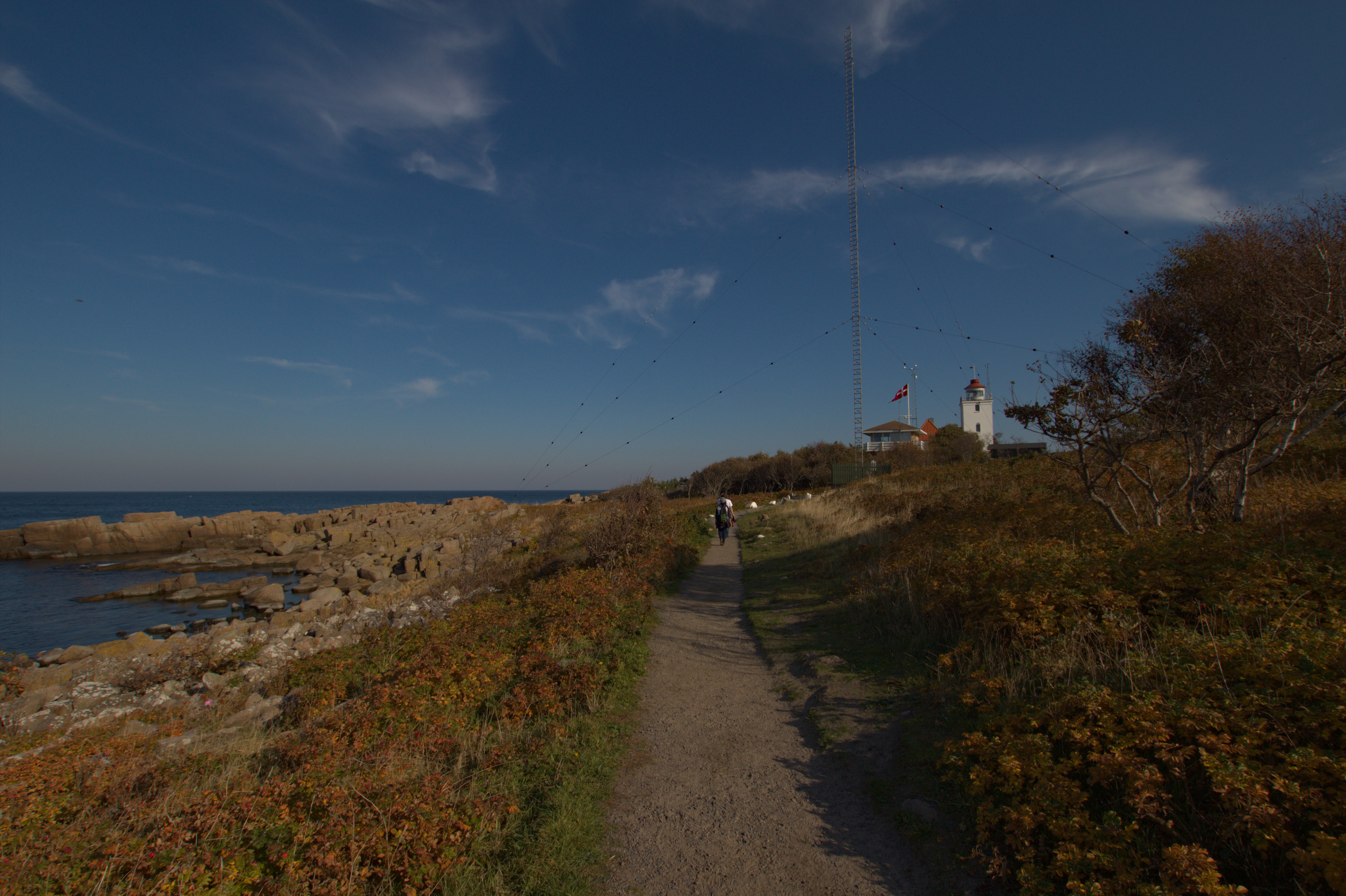 Hammerodde Fyr, 2018